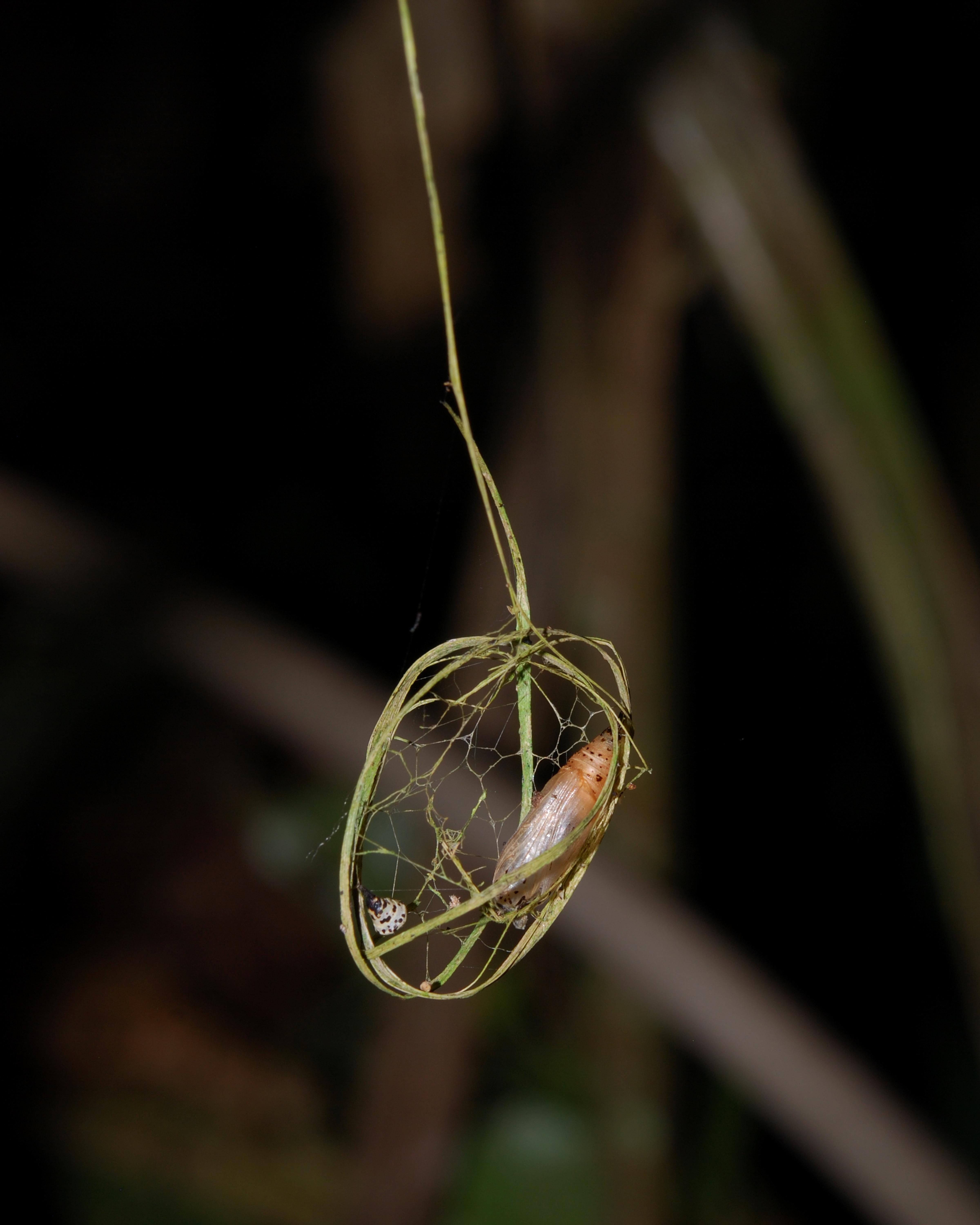 Lepidoptera: Urodidae Found in Yasuní National Park, Ecuador